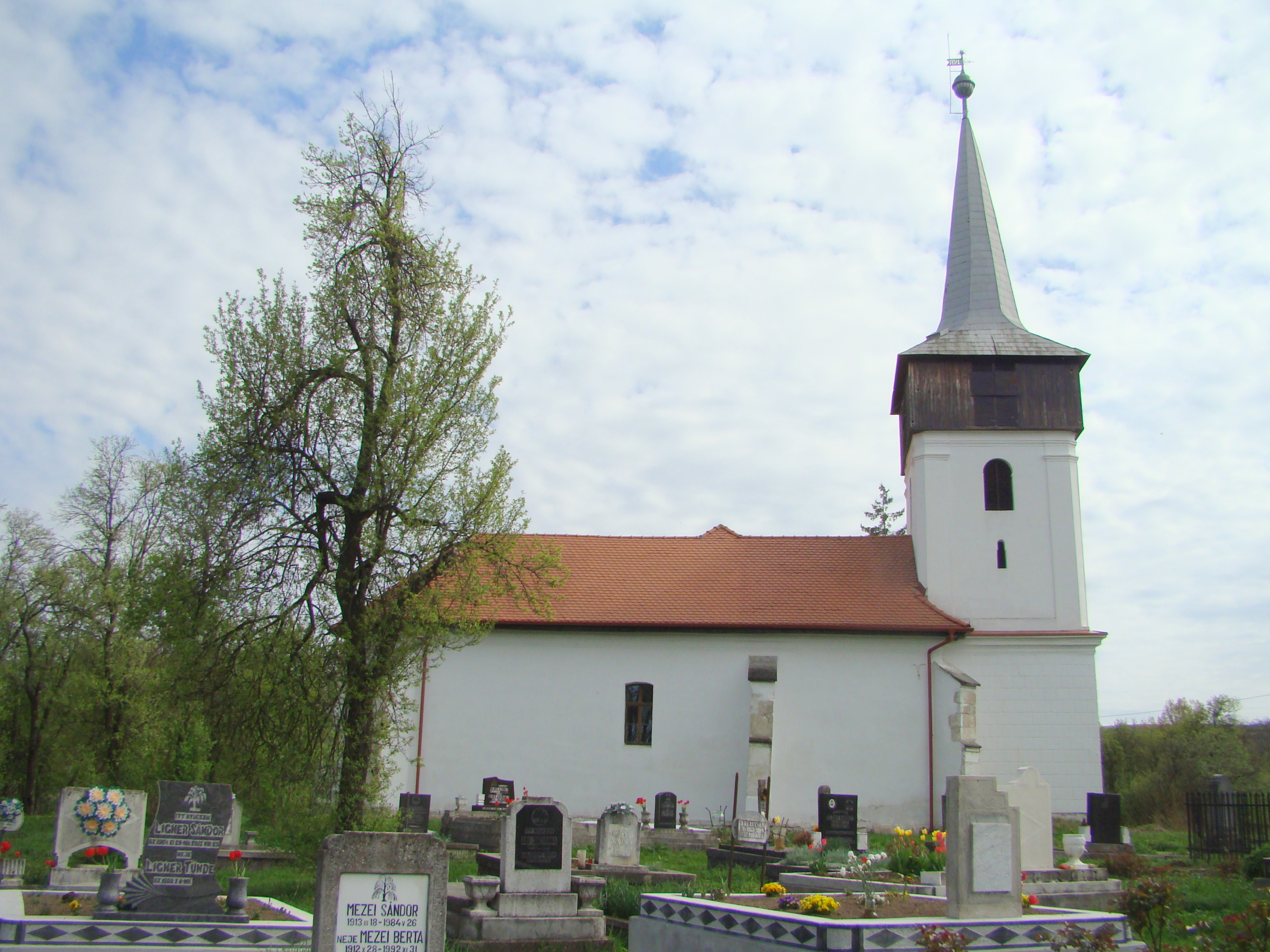 Biserica reformată, sat Cristur Crișeni; comuna Crișeni